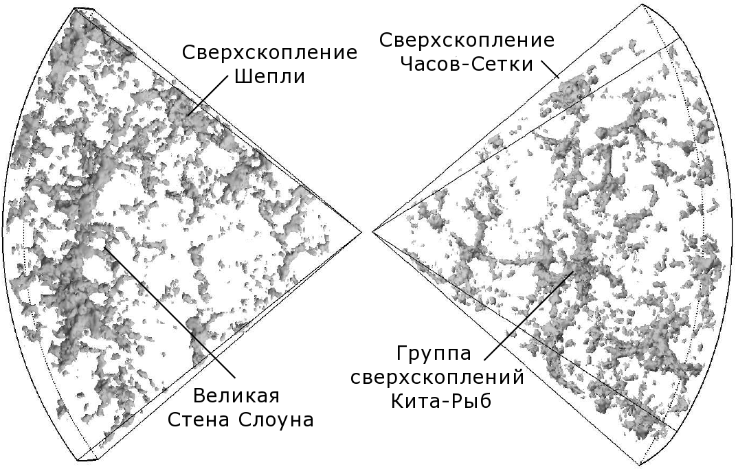 Великая Стена Слоуна и ее соседи